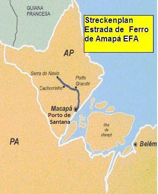 Streckenplan der Bahngesellschaft EFA, Brasilien